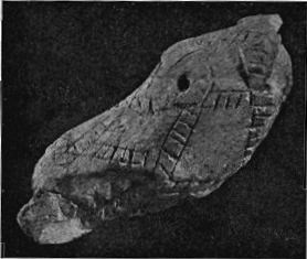 Галава каня з в. Рудня Полацкага раён. 12 ст